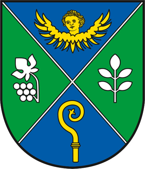 Der Krummstab deutet auf das alte, bedeutende Zisterzienserkloster Rein hin.